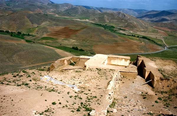 Kurdî: تپه زیویه (گنکه سوراخ)